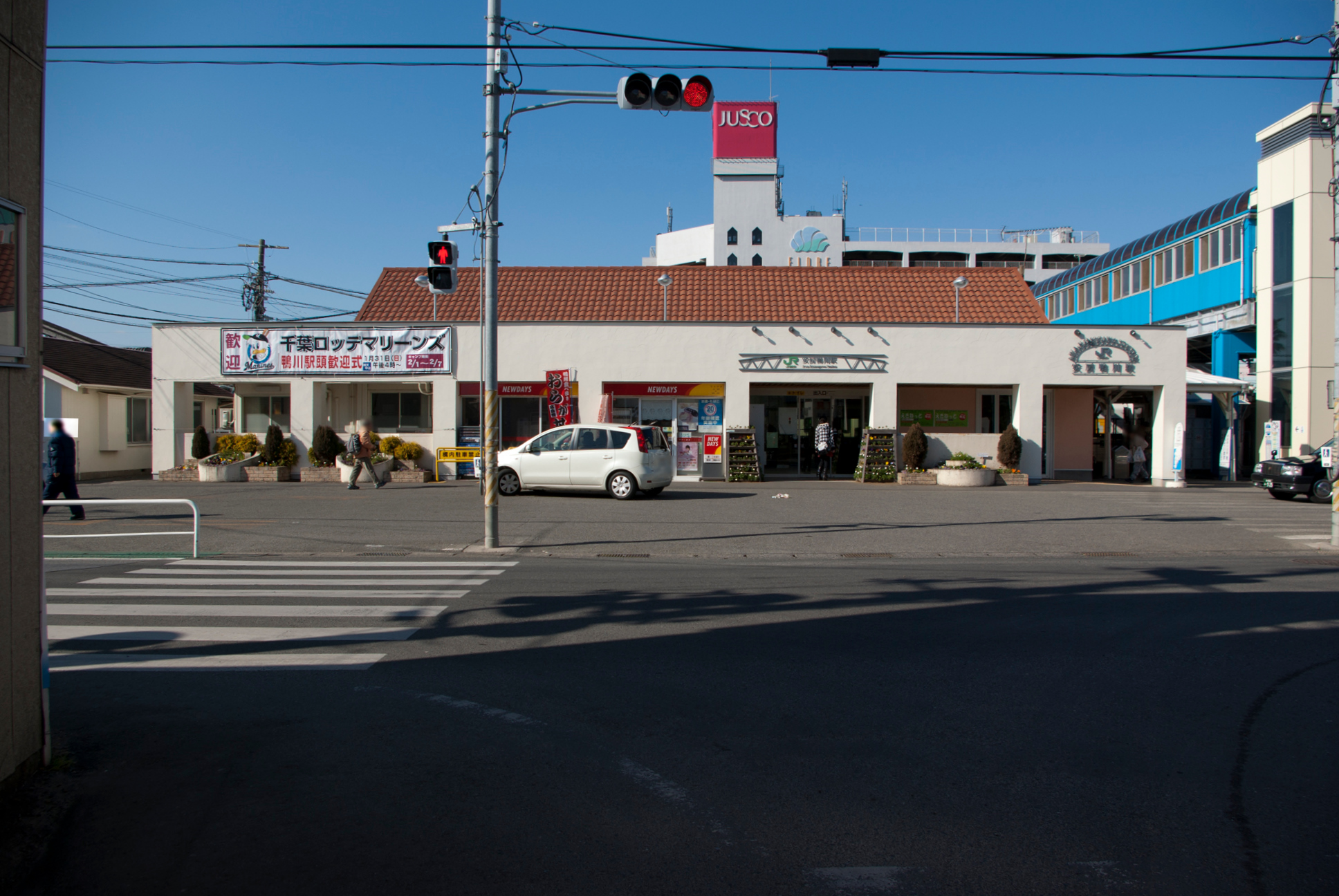 東日本旅客鉄道株式会社外房線、内房線安房鴨川駅